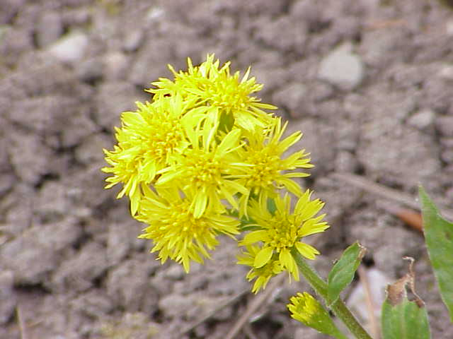 Species: Solidago virgaurea minuta Family: Asteraceae Image No. 1